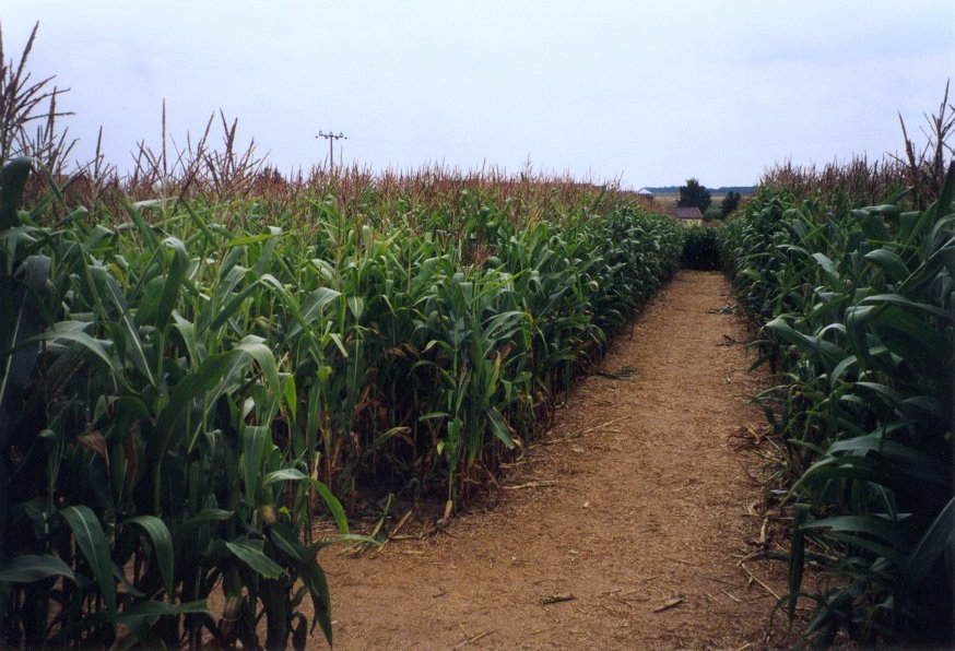 Bild in einem Maislabyrinth bei Nürnberg in Bayern aufgenommen